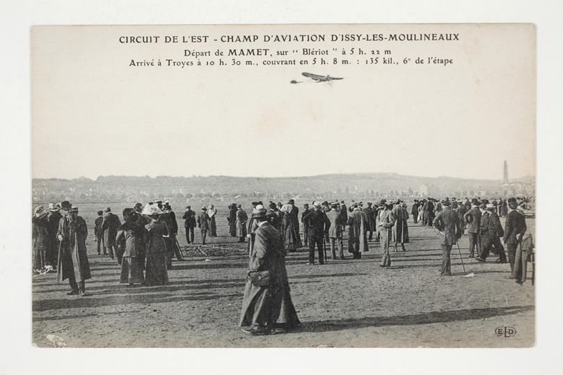 Circuit de l'Est - Champ d'Aviation d'Issy-les-Moulineaux - Départ de Mamet sur "Blériot" à 5 h. 22 m. Arrivée à Troyes à 10 h. 30 m. couvrant en 5 h. 8 m. : 135 kil., 6 e de l'étape Circuit en boucle, du 7 au 17 août 1910, reliant les villes de Troyes, Nancy, Charleville-Mézières, Douai et Amiens. Éditeur : E.L.D Adresse actuelle : Héliport Date : 1910